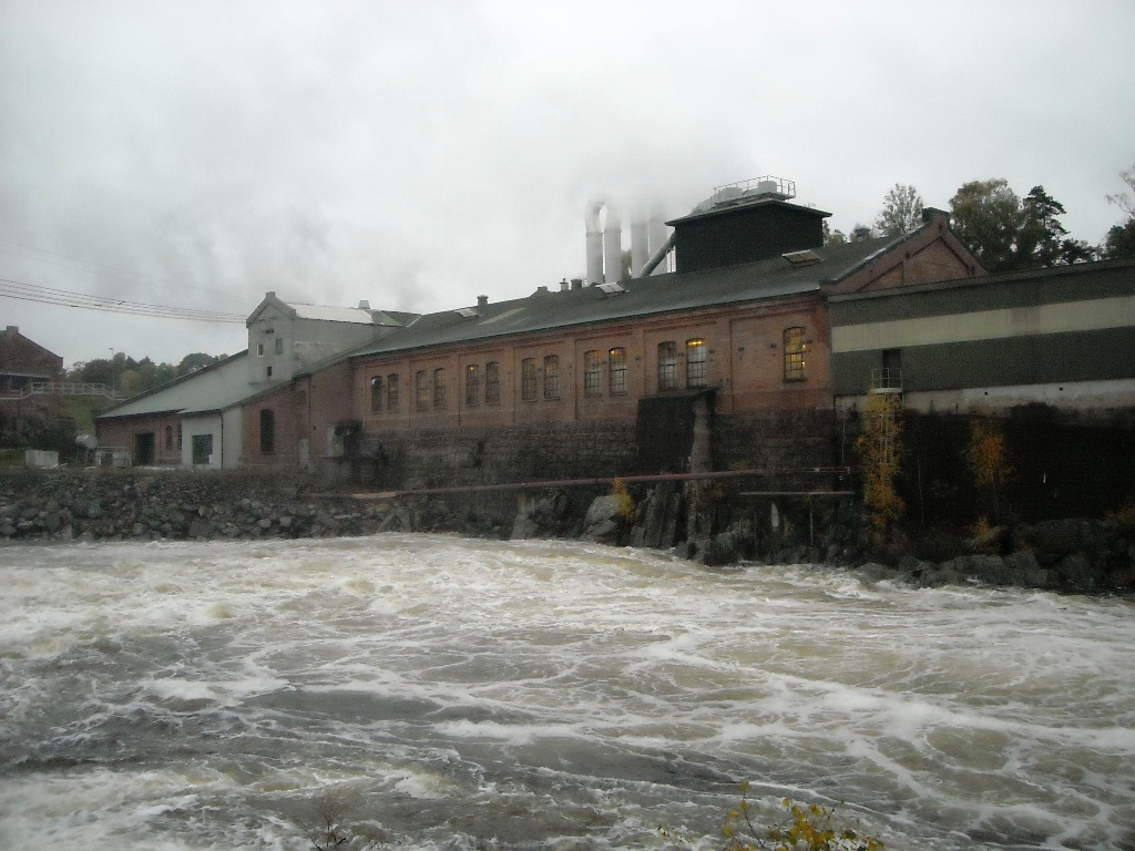 Tremassefabrikken Rygene - Smith & Thommesen på Rygene i Arendal